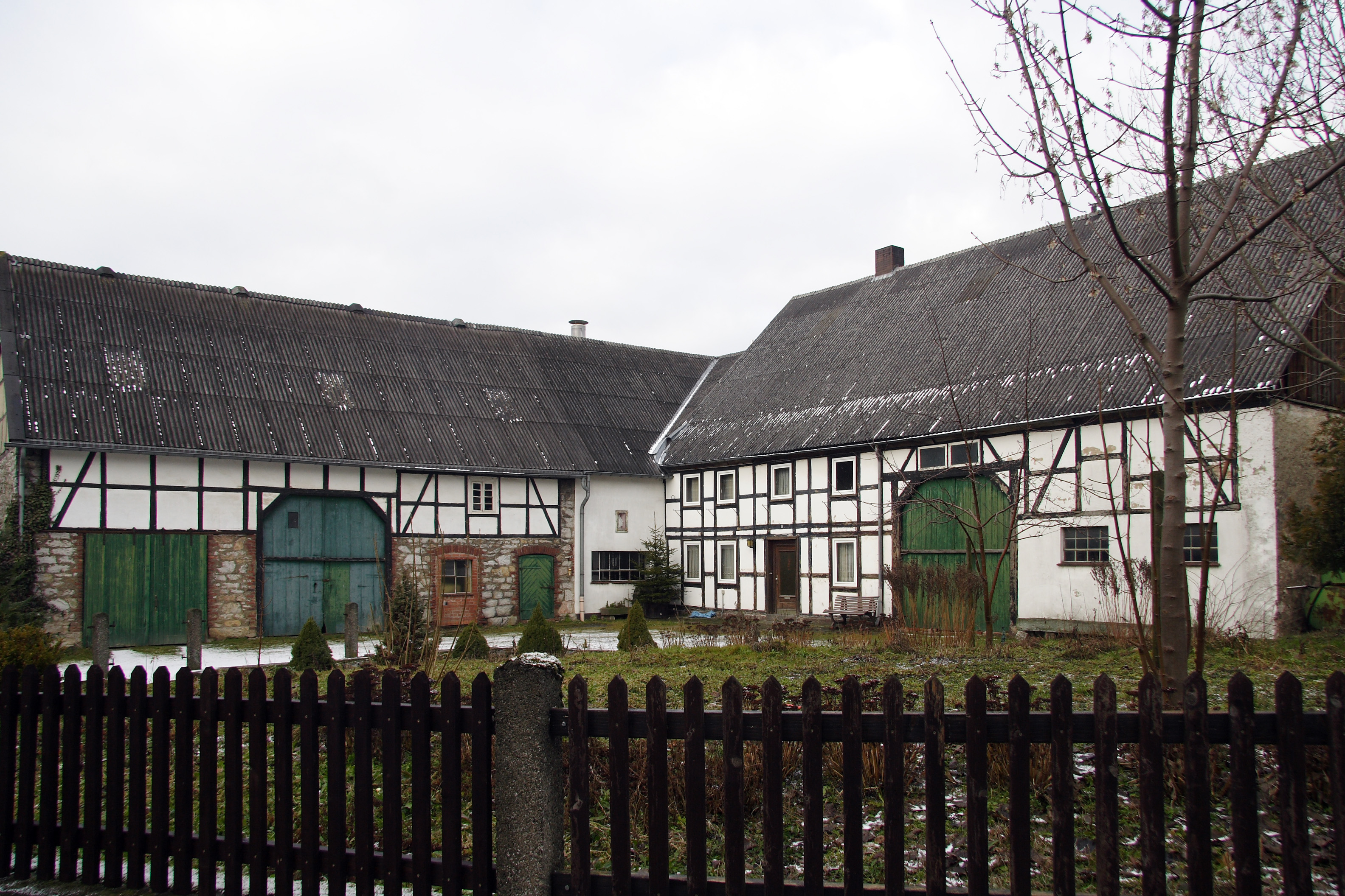 Bauernhof in Madfeld, einem Ortsteil von Brilon